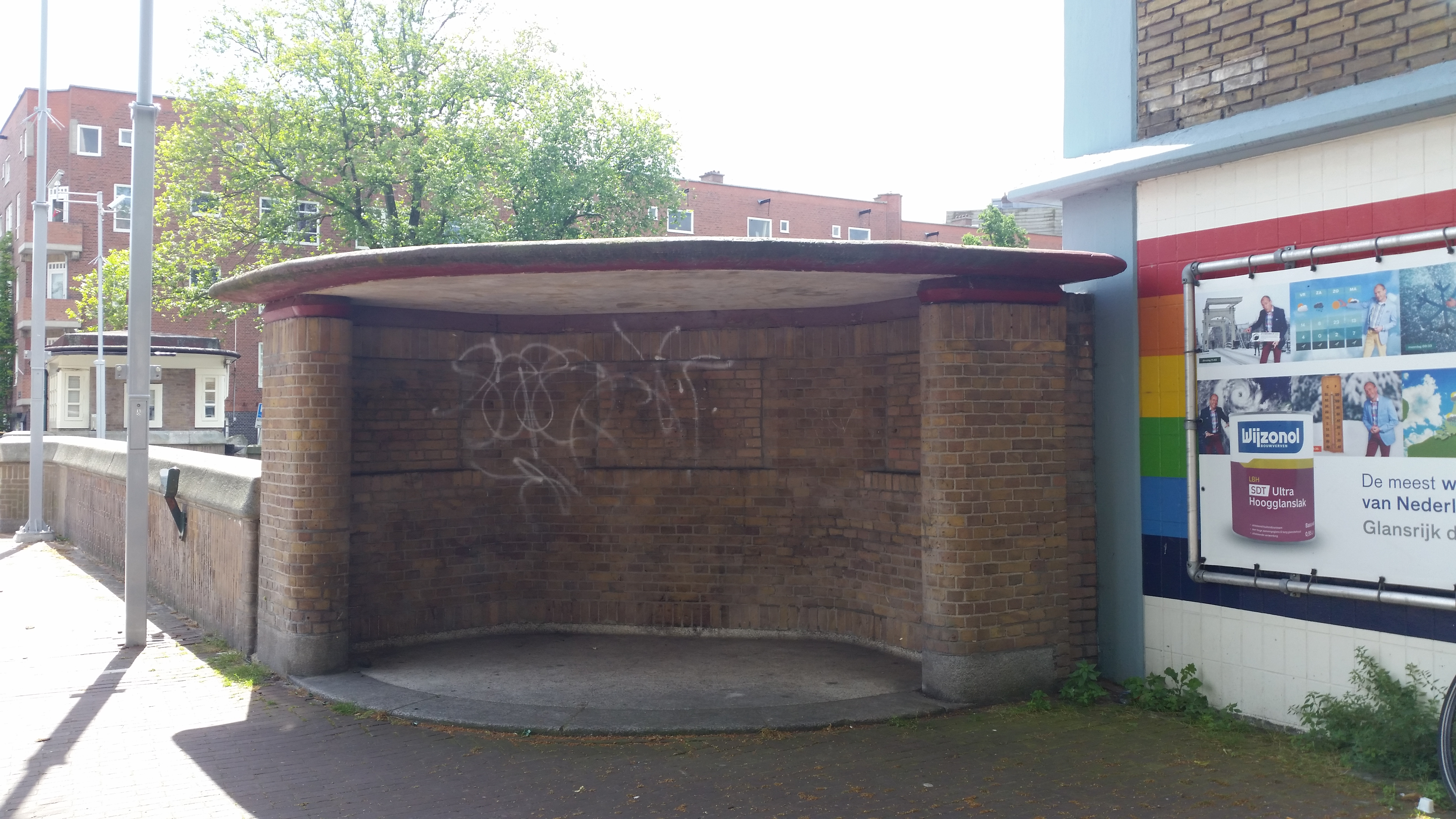 Brug 171 over Kostverlorenvaart in de Van Hallstraat, Amsterdam, wachthuisje